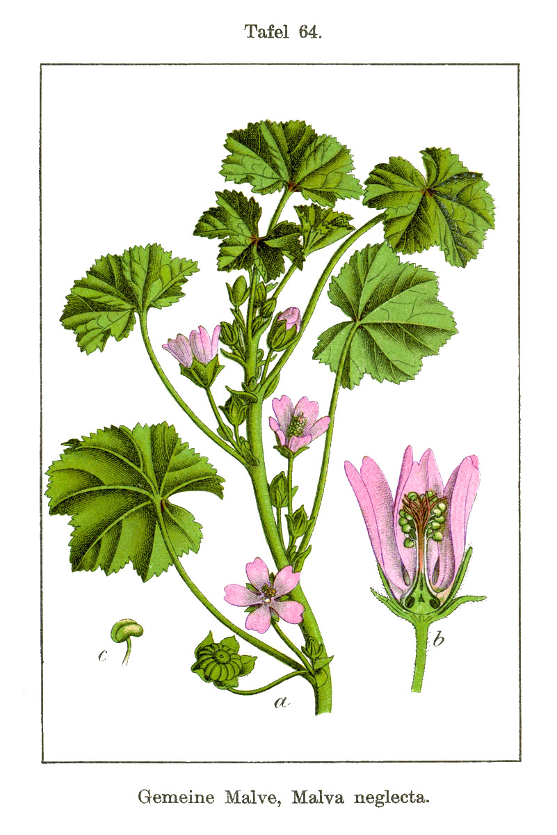 Original Caption Gemeine Malve, Malva neglecta